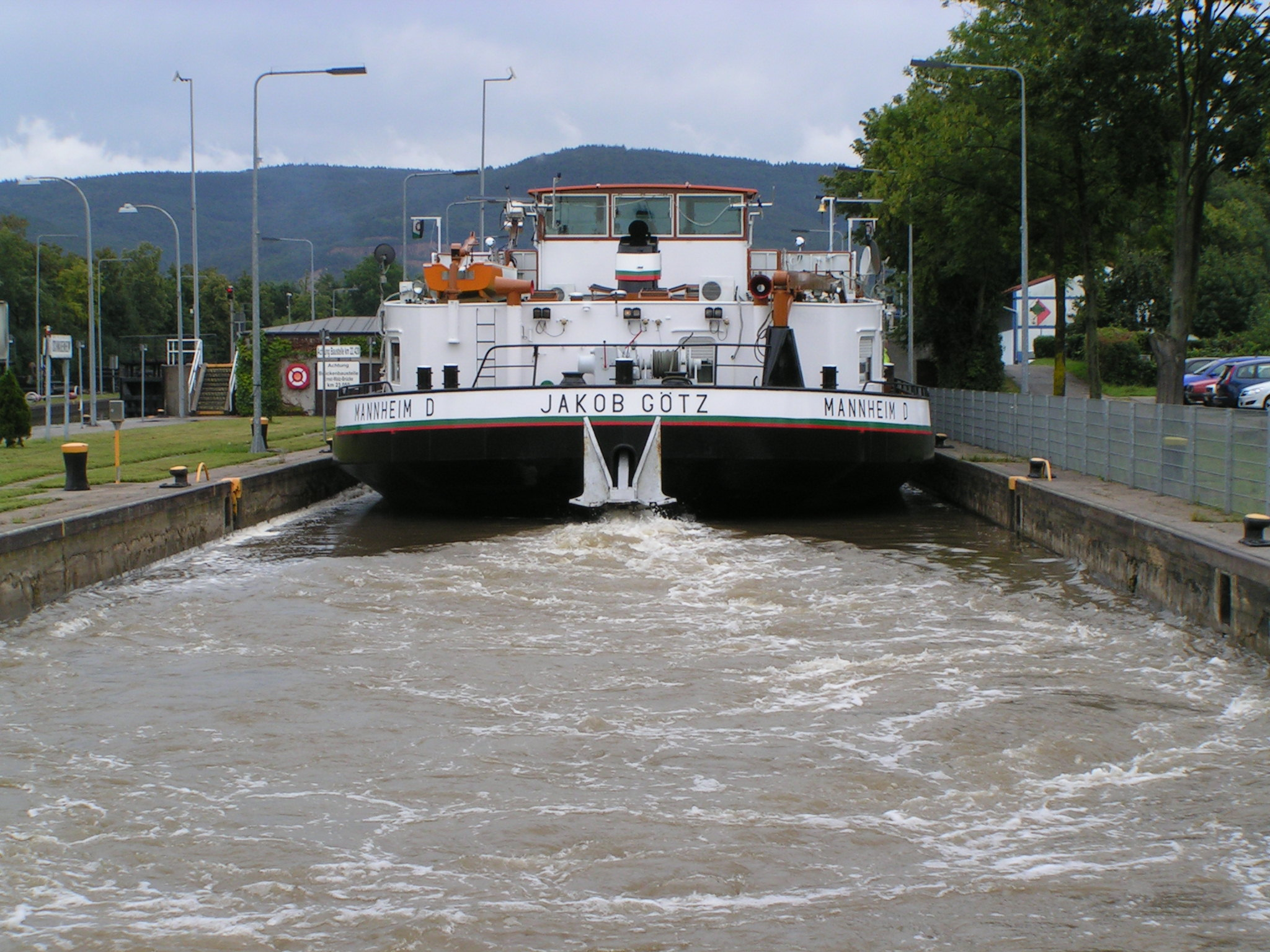 Neckarschleuse Schwabenheim bei Heidelberg